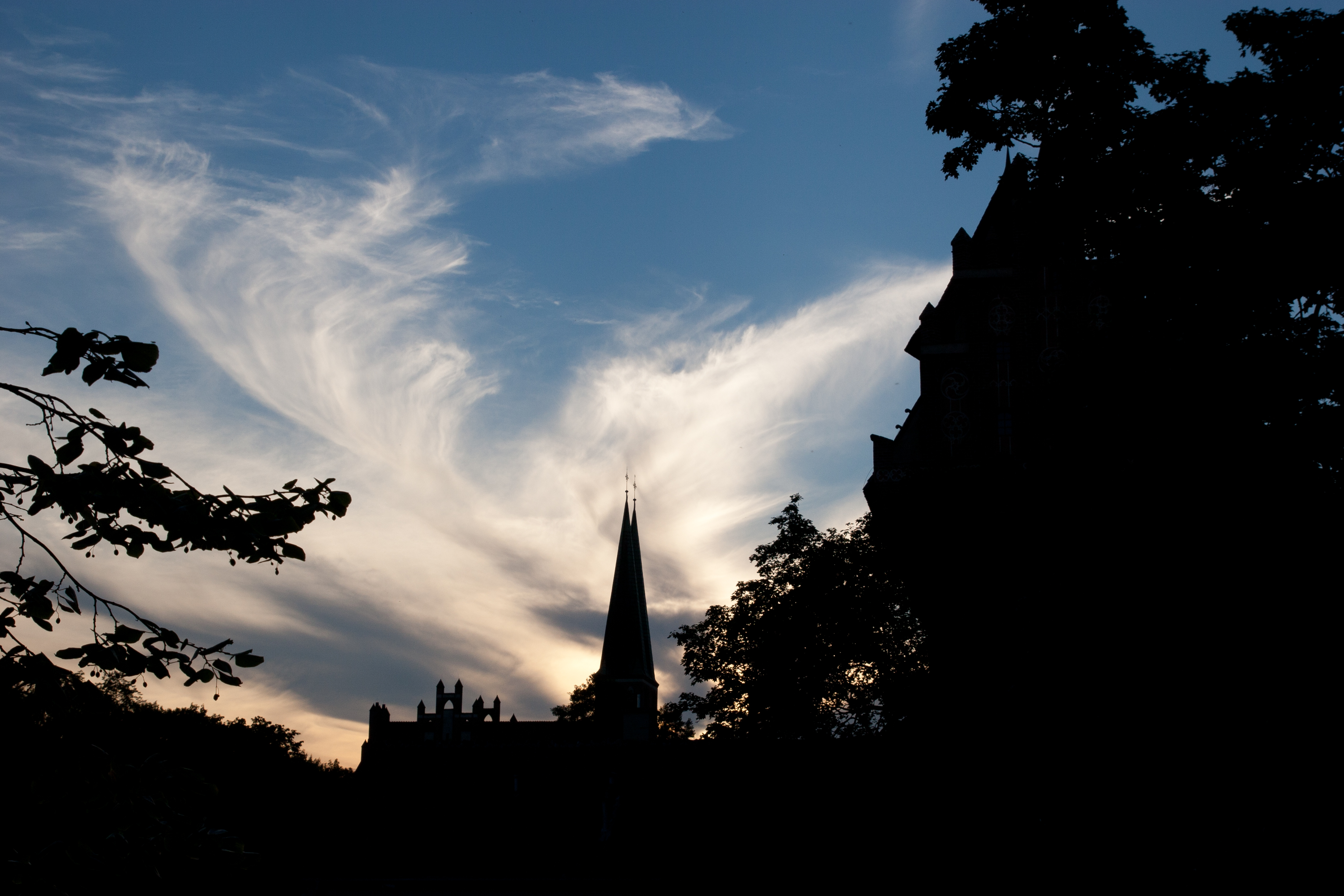 Niebo chylące się ku zachodowi nad kościołem garnizonowym w Olsztynie